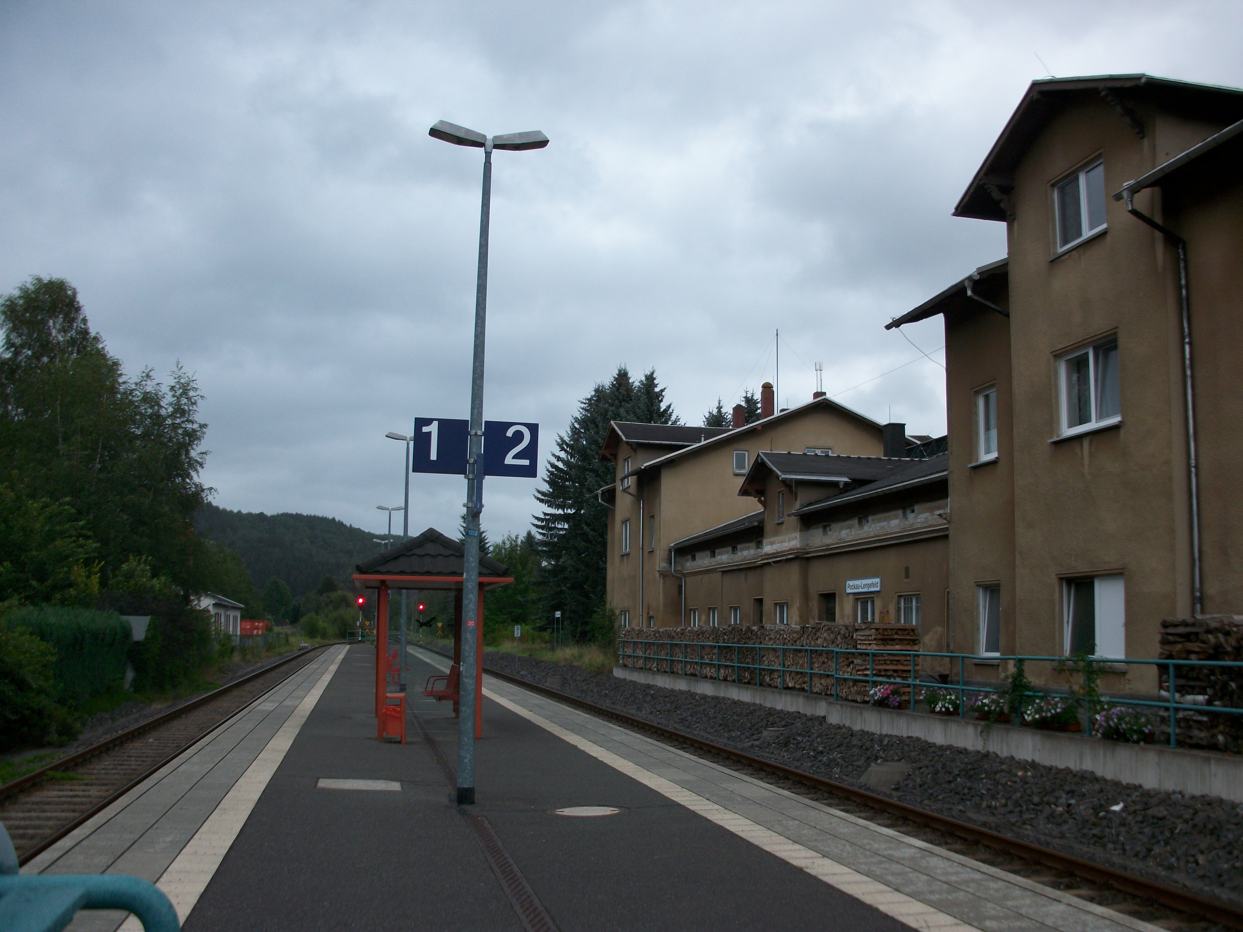 Bahnhof Pockau-Lengefeld, Olbernhauer Seite (2016)